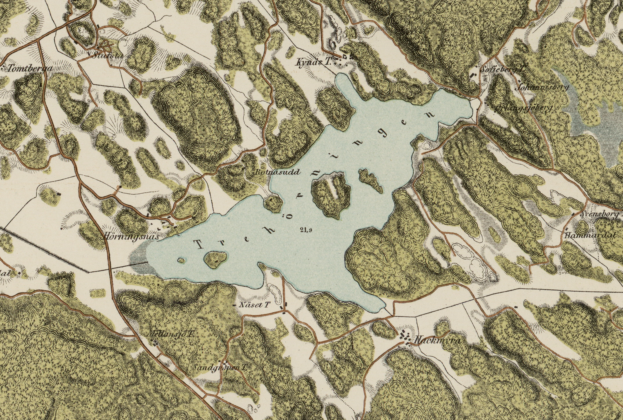 Topografiska corpsens karta visande sjön Trehörningen i Huddinge socken